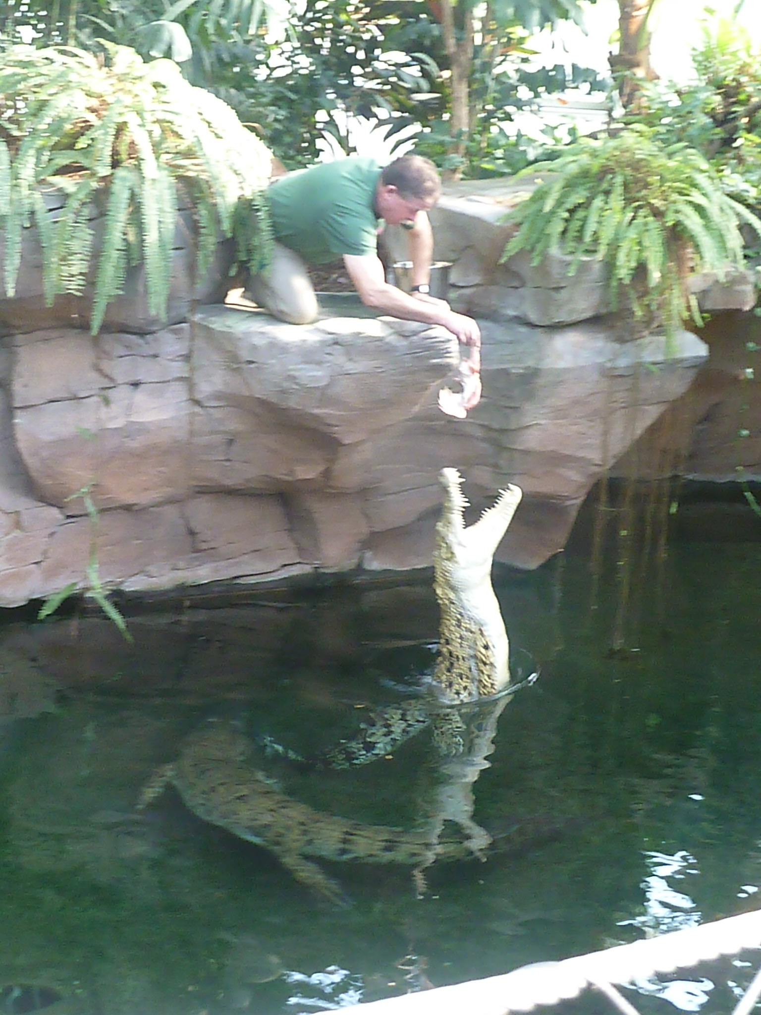 Leistenkrokodilfütterung Wilhelma Stuttgart